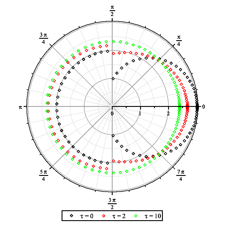 Méthode S60 pour un milieu homogène semi-infini avec diffusion isotrope.